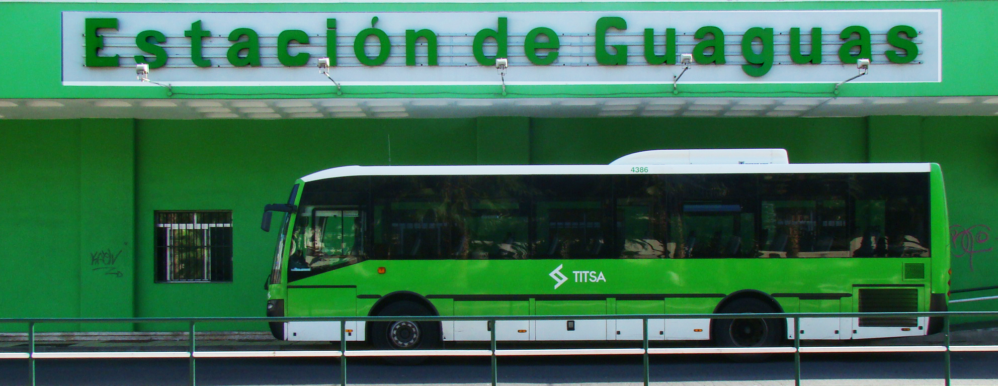 Estación de Guaguas de Puerto de la Cruz, Tenerife, Canarias